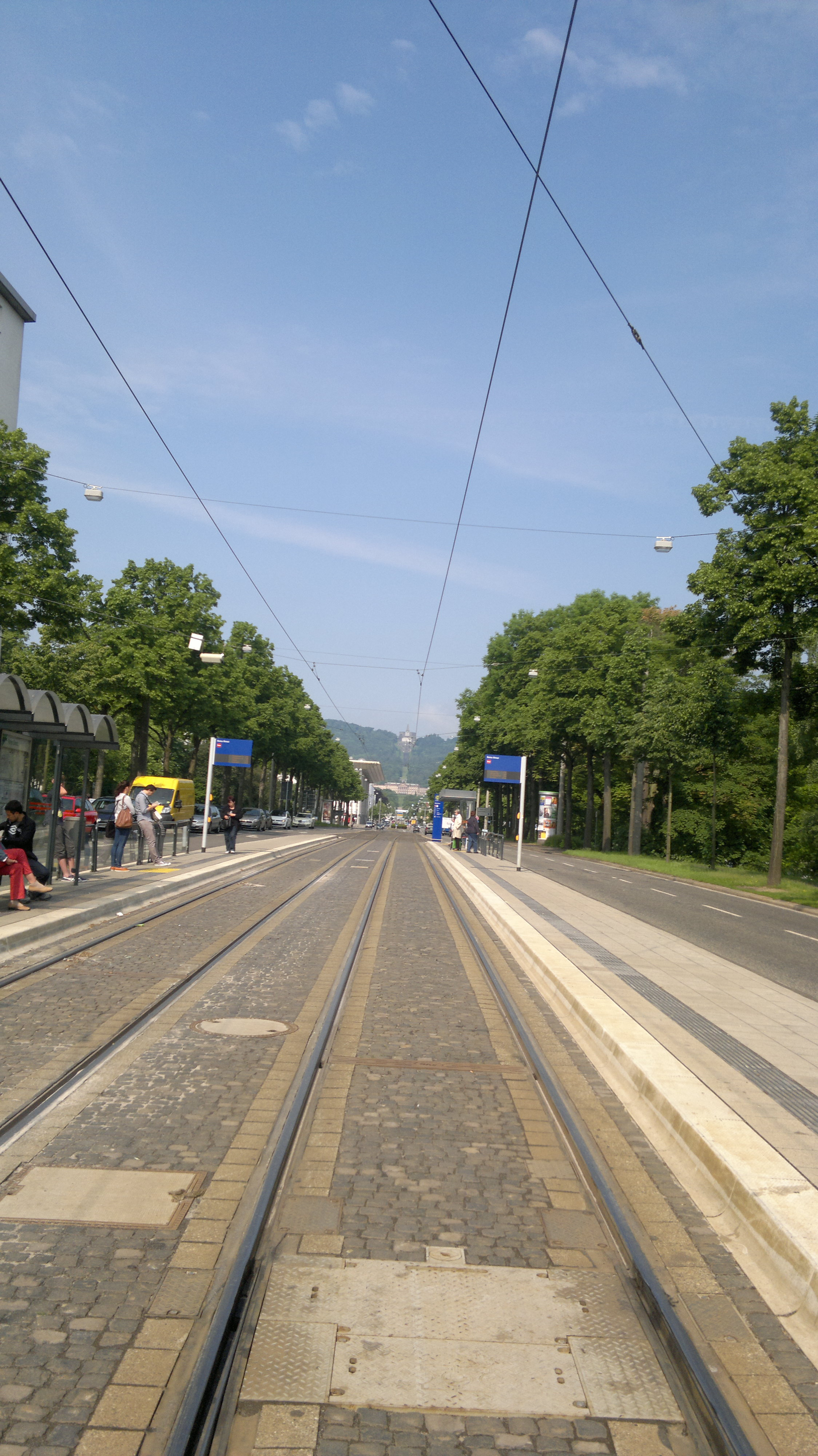 Háttérben a Wilhelmshöhe kastély,Hercules